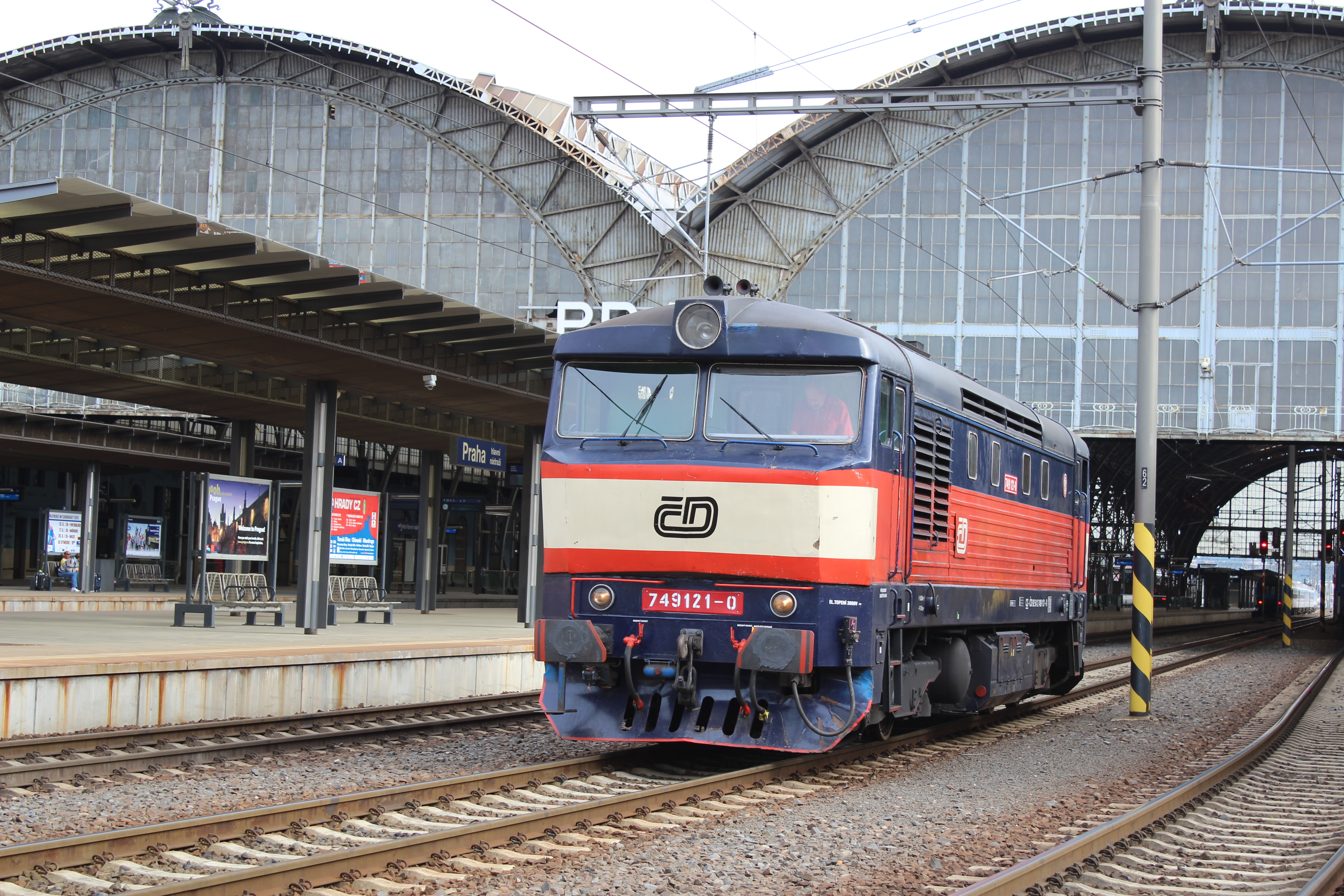 Motorová lokomotiva řady 751 nebo T 478.1 jak byla označována do roku 1988. Skříňová čtyřnápravová dieselová lokomotiva. Uspořádání pojezdu Bo- Bo . Označována přezdívkou Zamračená,nebo Bardotka podle charakteristických oken a tvarování čela lokomotivy. Podle zkušeností v provozu je považována za jednu z nejlepších lokomotiv ČKD Praha. ČKD ji vyrábělo v letech 1964 - 1971. Parametry elektrický stejnosměrný přenos výkonu, max. povolená rychlost 100 km/h, trvalá tažná síla lokomotivy 120 kN, maximální tažná síla 220 kN, hmotnost 75 tun. Část strojů byla v 90. letech vybavena zařízením pro elektrické vytápění vlaků a označována jako řad 749.